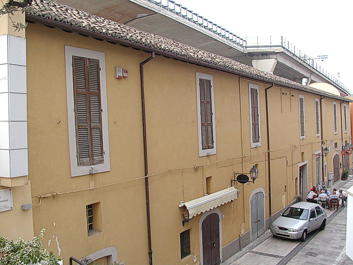 Pescara Centro Storico